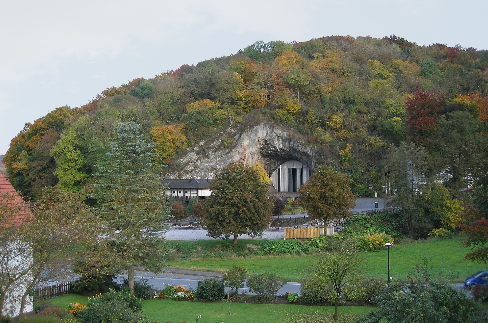 Balver Höhle, Helle in Balve.